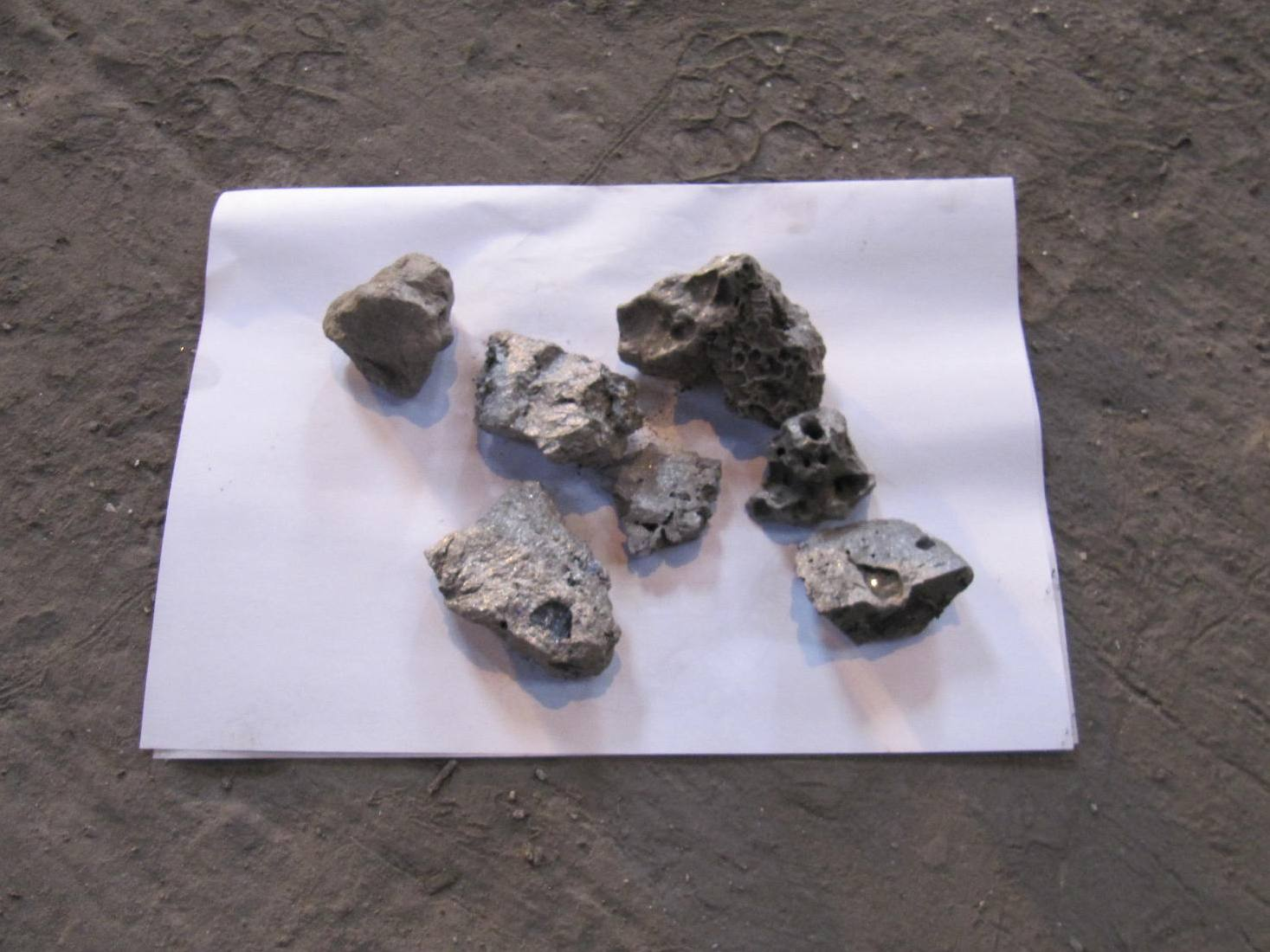 Echantillons de ferrochrome affiné, utilisés en sidérurgie (posés sur feuille A4)